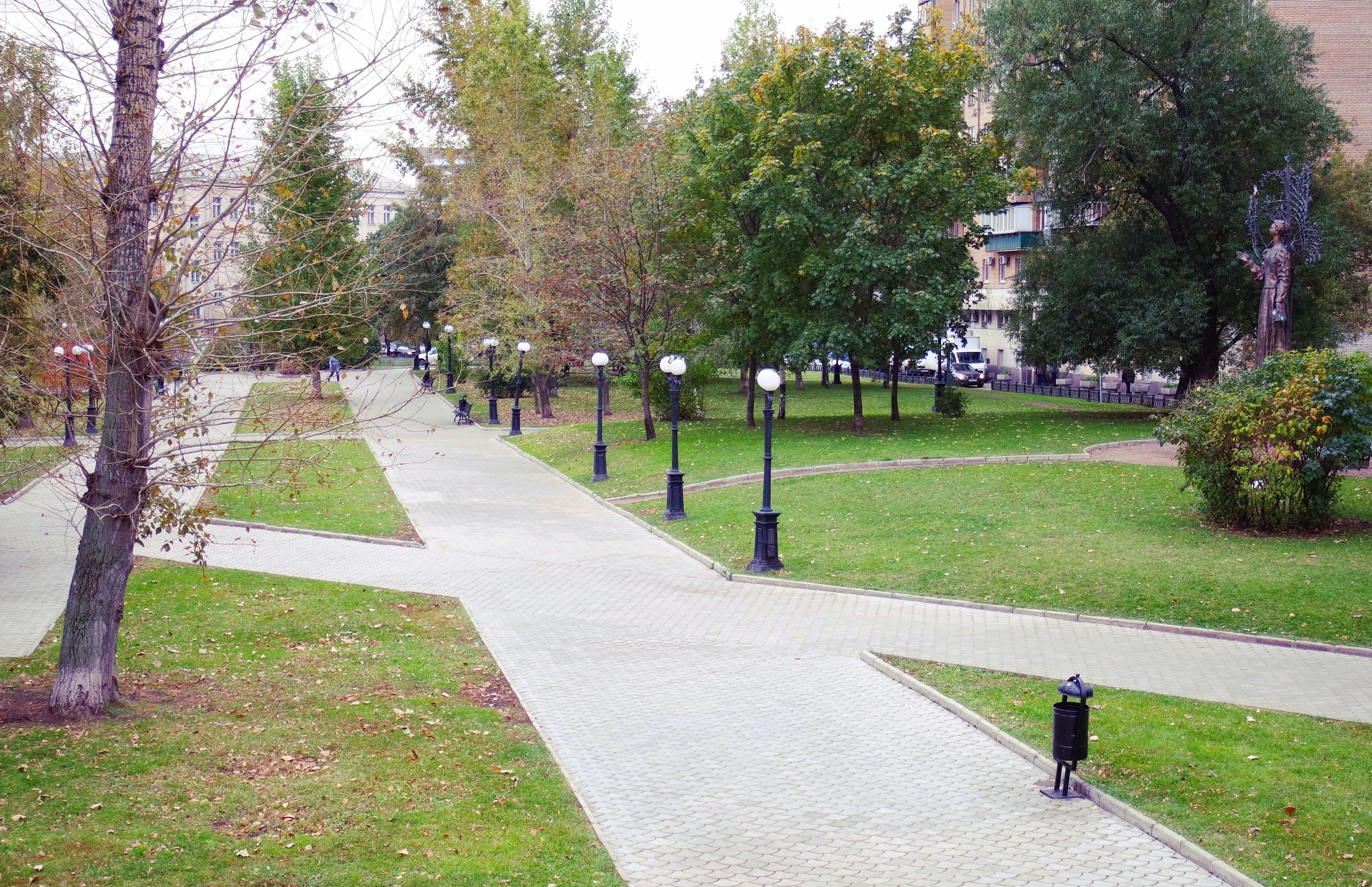 Украинский бульвар, южная часть. Справа — памятник Лесе Украинке